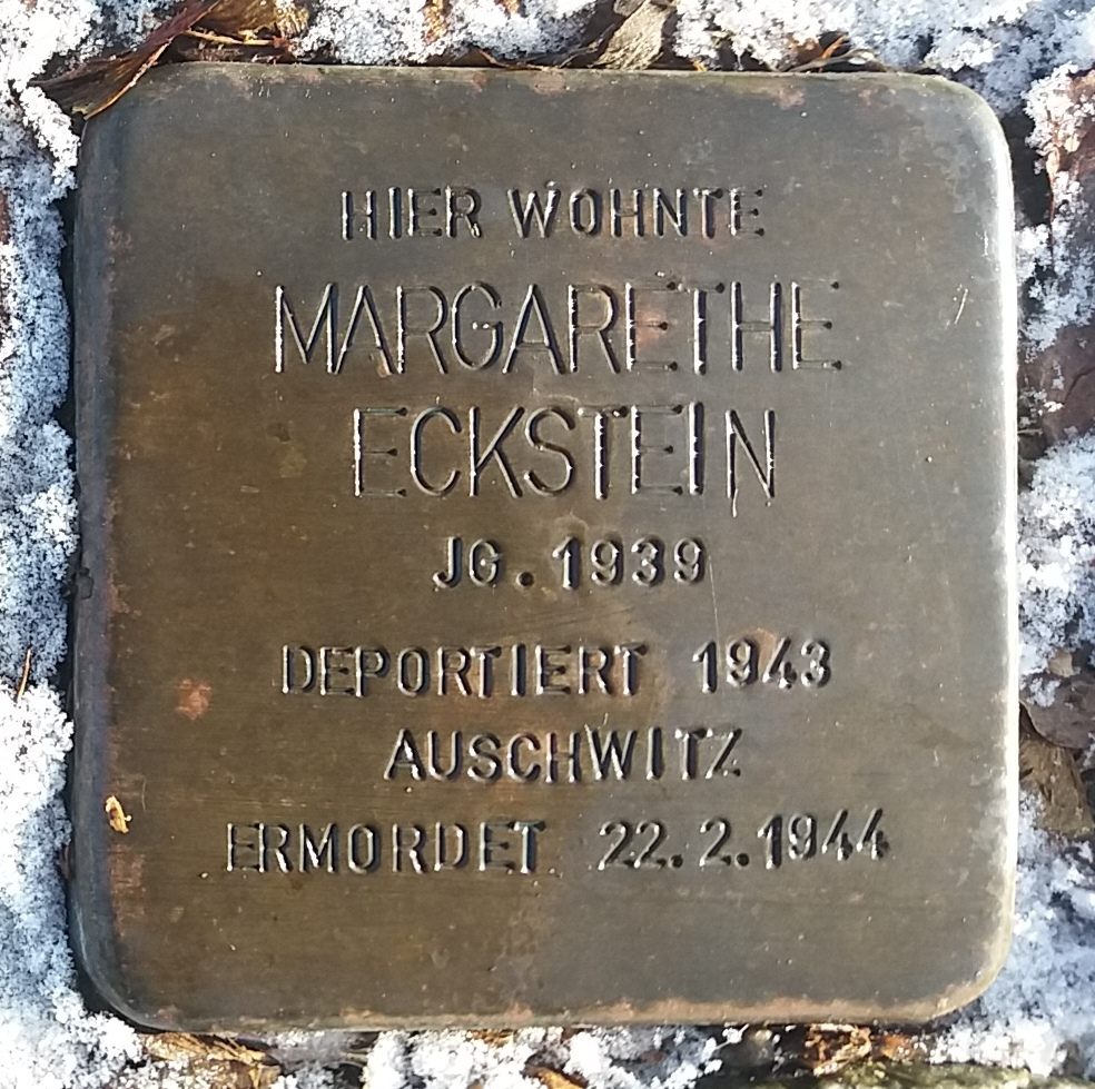 Stolperstein für Margarethe Eckstein, Mitglied der Großfamilie Eckstein, Vöhringen (Iller)